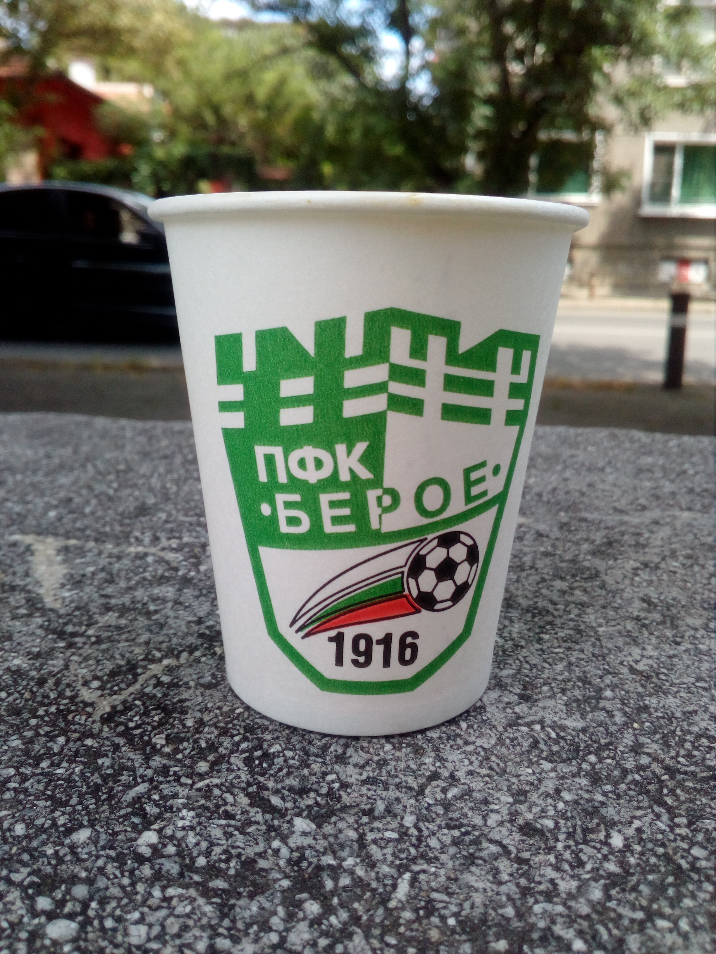 Чаша на ПФК "Берое" от улична кафе машина в Стара Загора